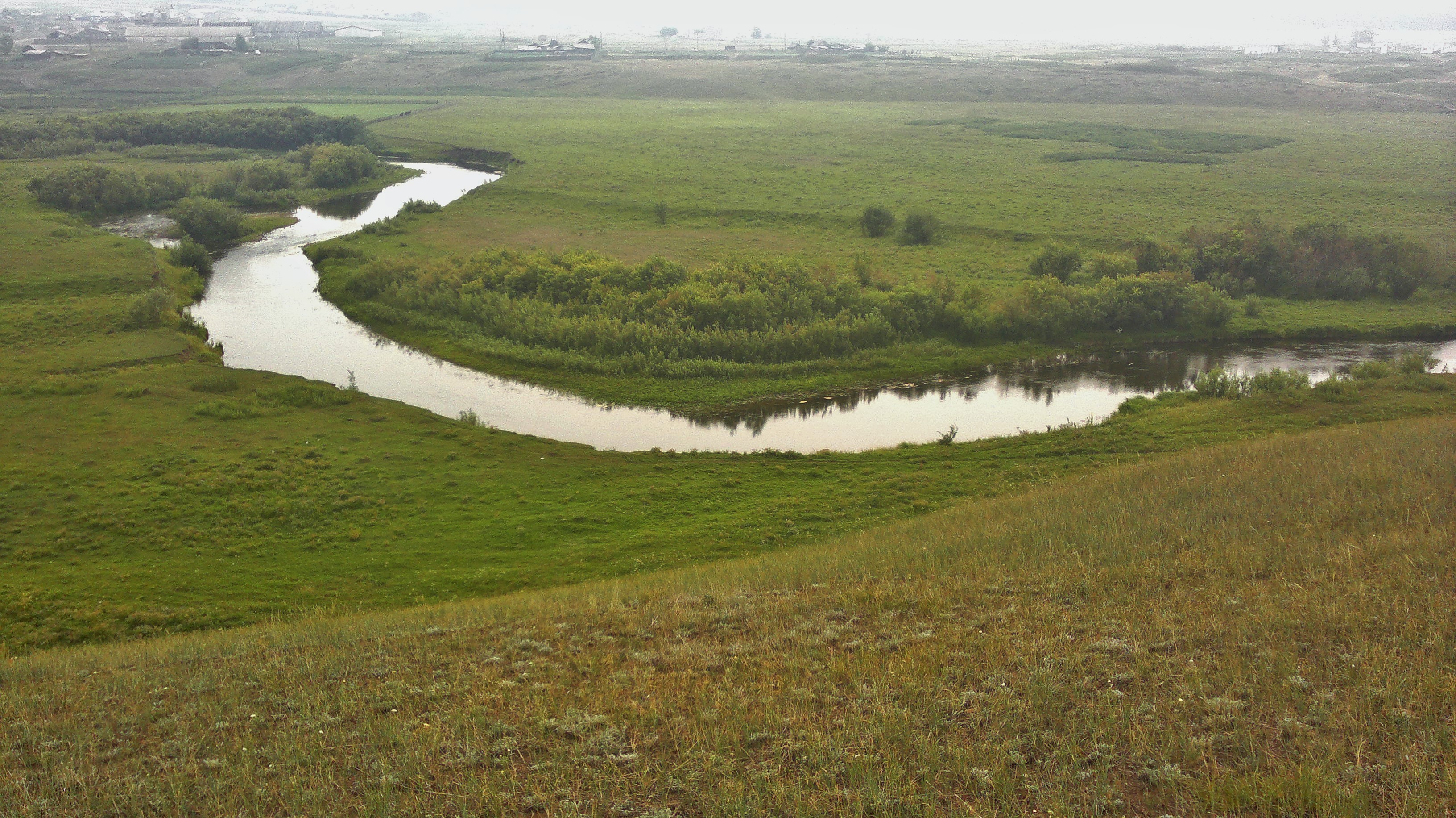 Река Ида вблизи села Морозово